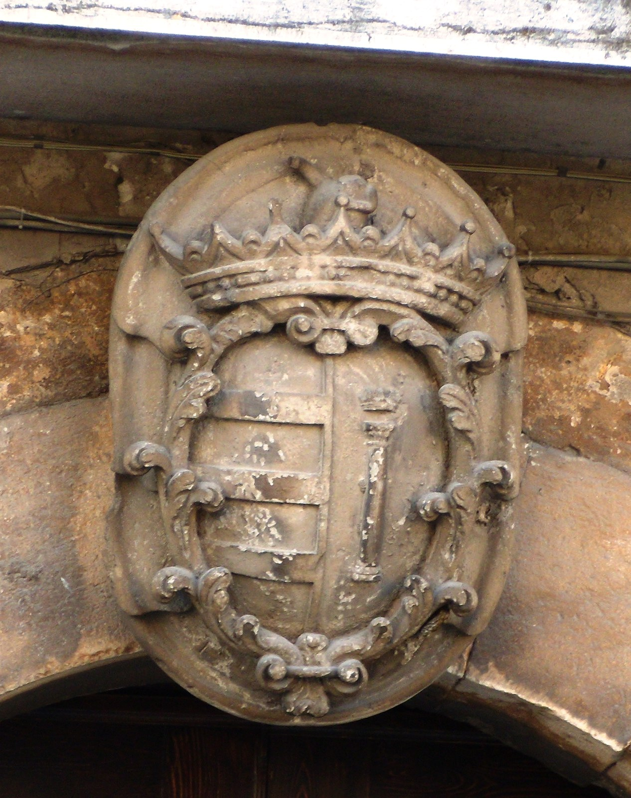 Lo stemma in pietra della famiglia Carafa-Colonna impresso sul portale della Taverna ducale di Cerreto Sannita.